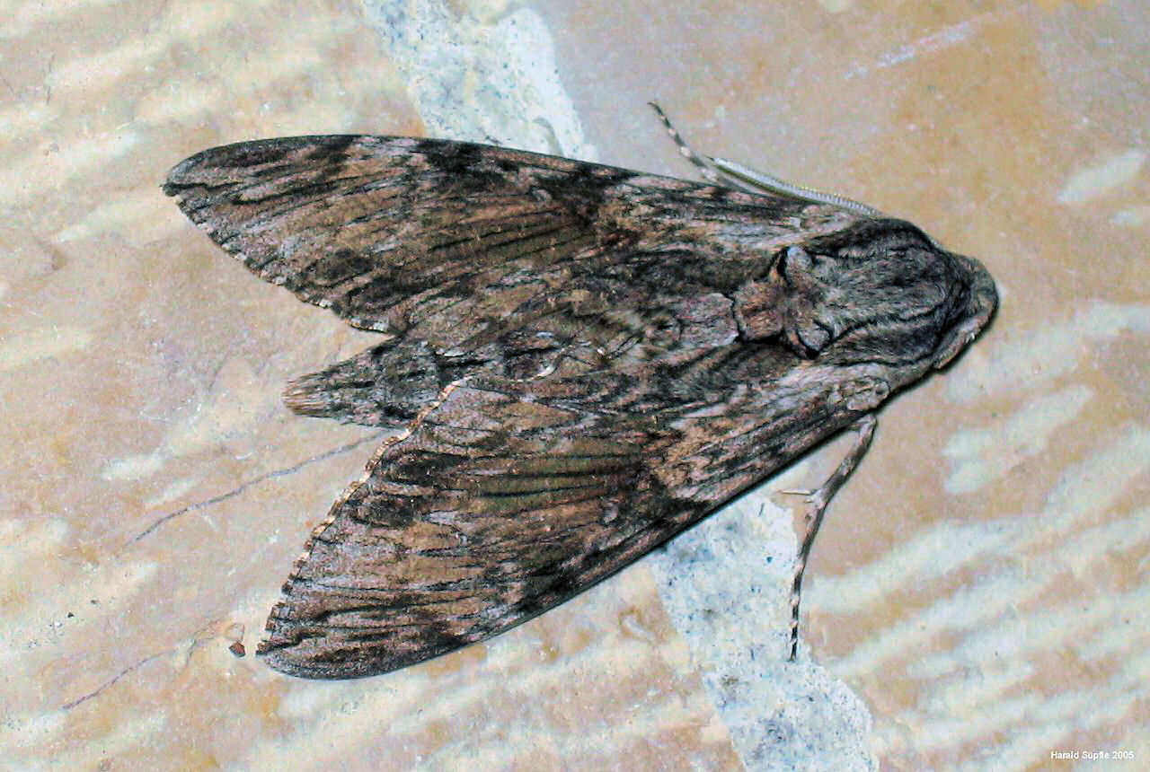 Agrius convolvuli